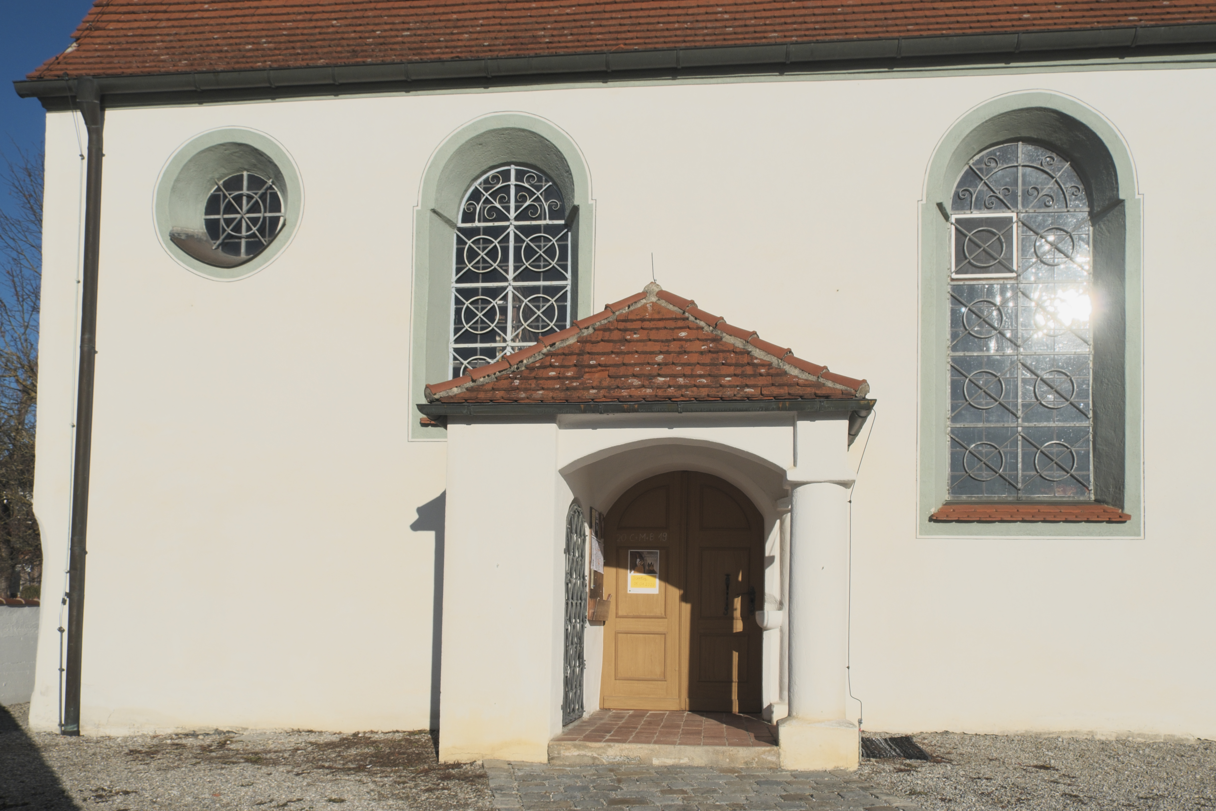 Katholische Pfarrkirche Zur Schmerzhaften Muttergottes in Unterfinning (Finning) im oberbayerischen Landkreis Landsberg am Lech (Bayern/Deutschland), Vorzeichen